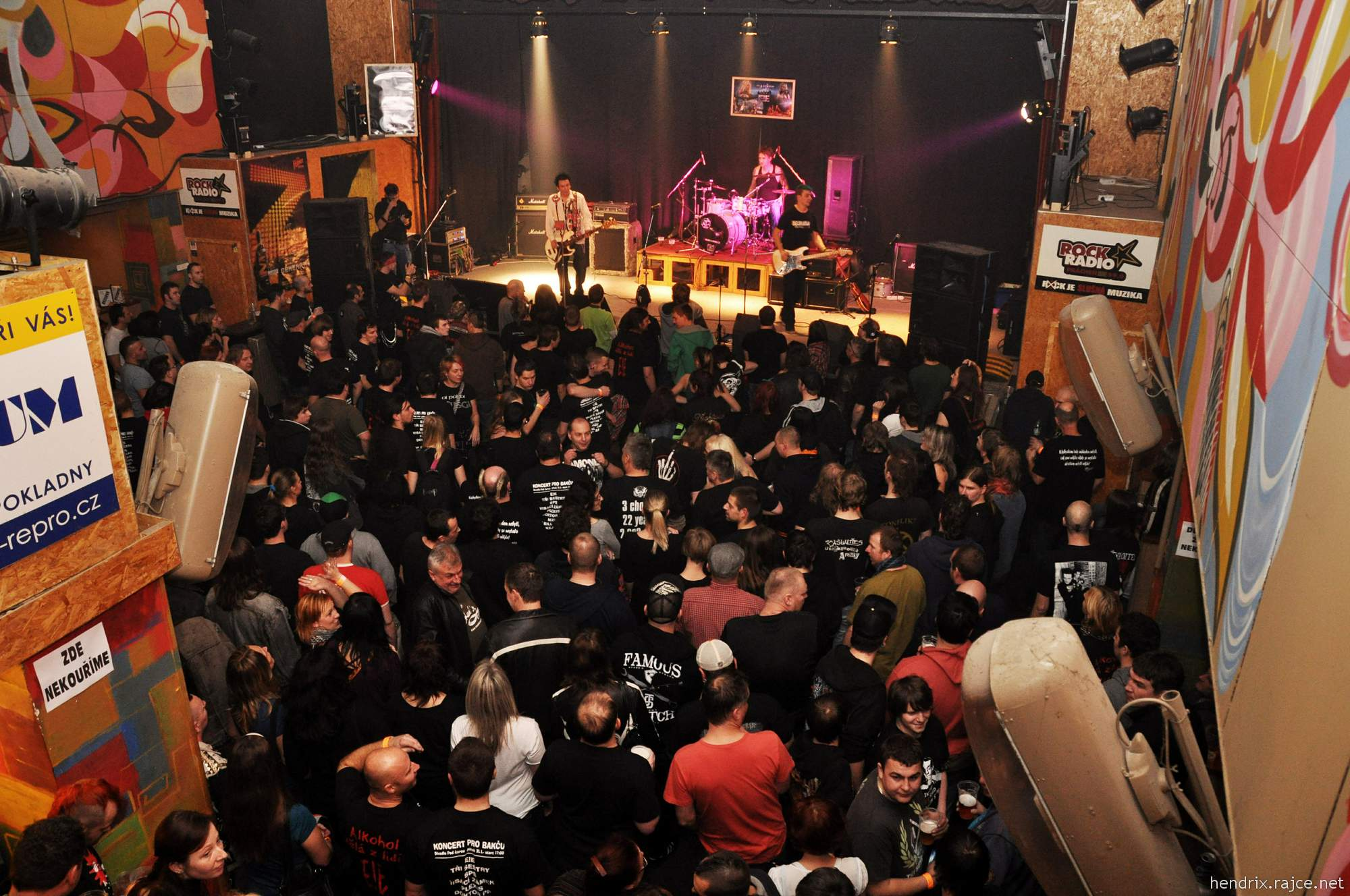 Hlavní sál Divadla Pod čarou (Kulturní dům Písek, nábřeží 1. máje 1506).